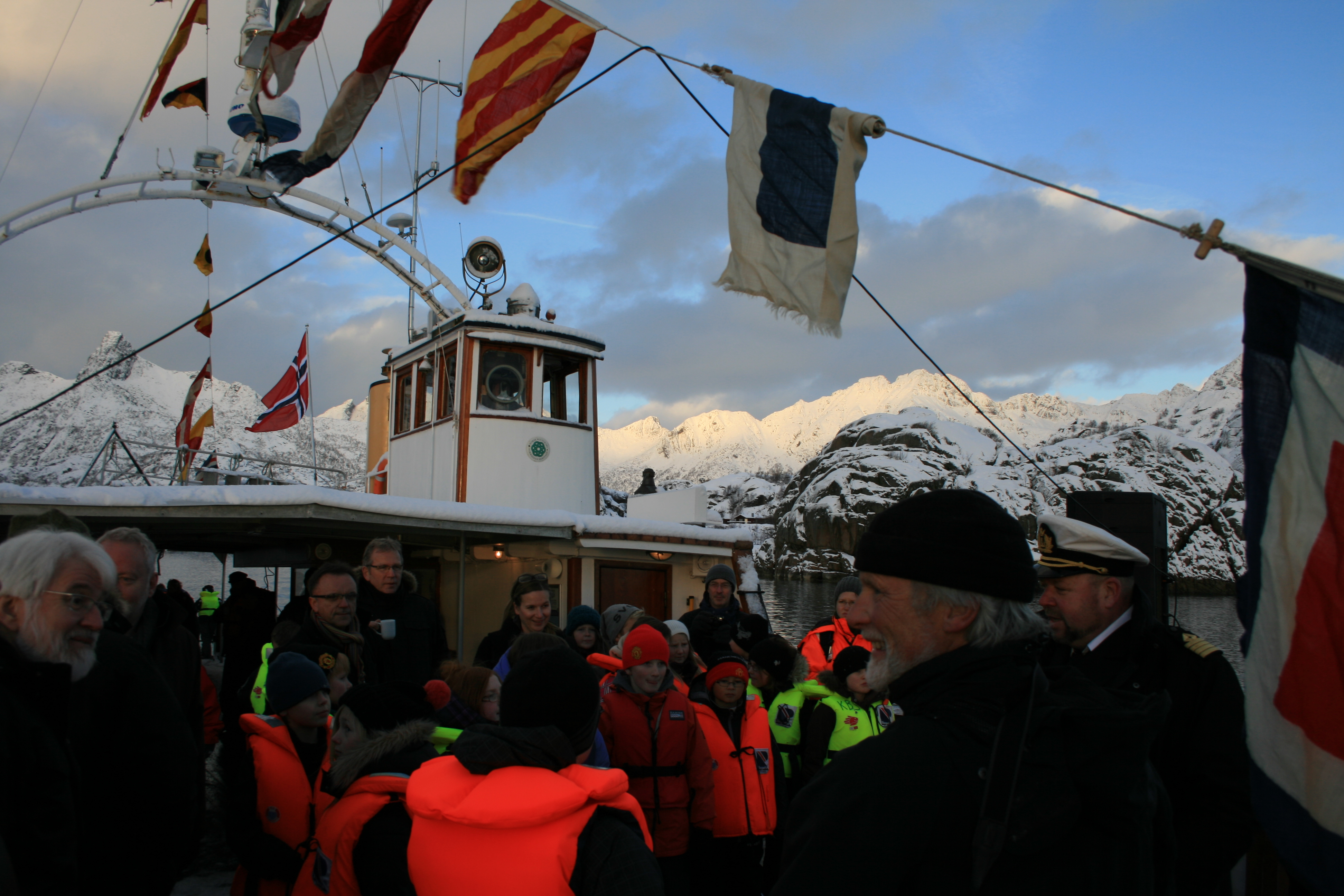 Riksantikvaren feirer og freder i flott vær